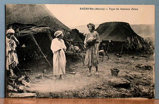 Autorisation accordée par:Webmeister:Alexandre Auteur et droits sur cette photo :Copyright © Photo:femme Zayane 1907